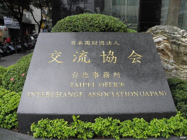 中文（中国大陆）: 日本交流协会台北事务所额石。